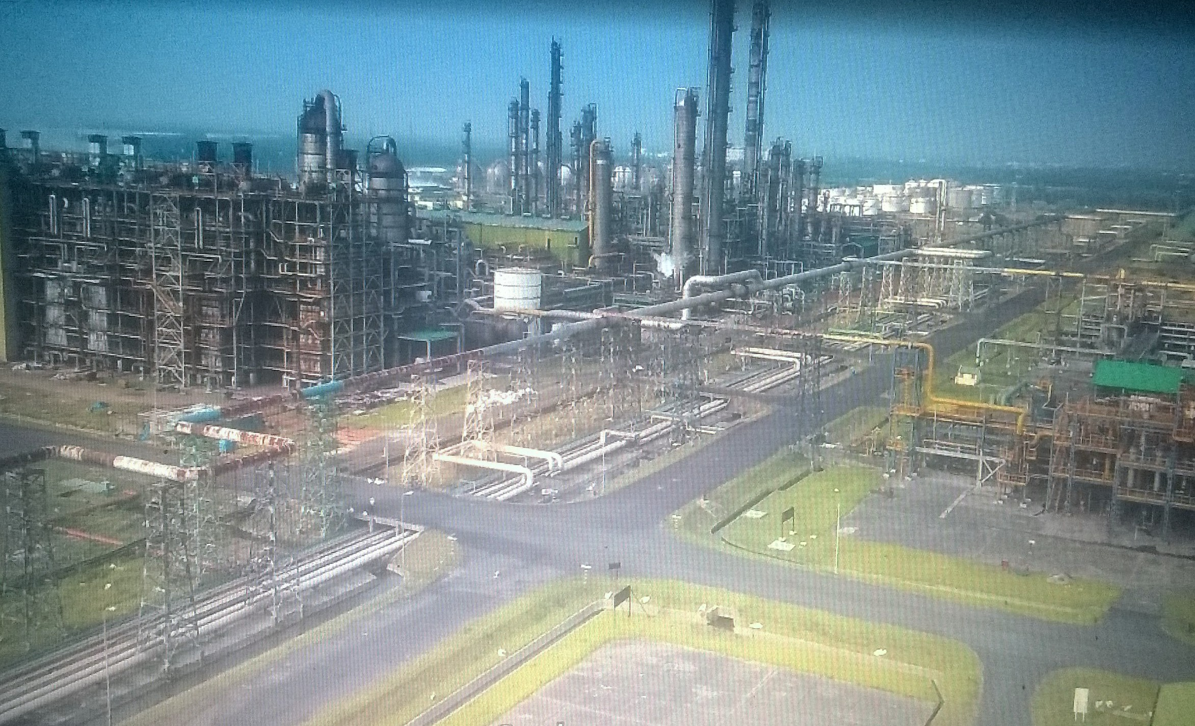 হলদিয়া পেট্রোকেমিক্যালস লিমিটেড